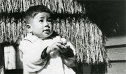 Yasuo Fukuda as a child